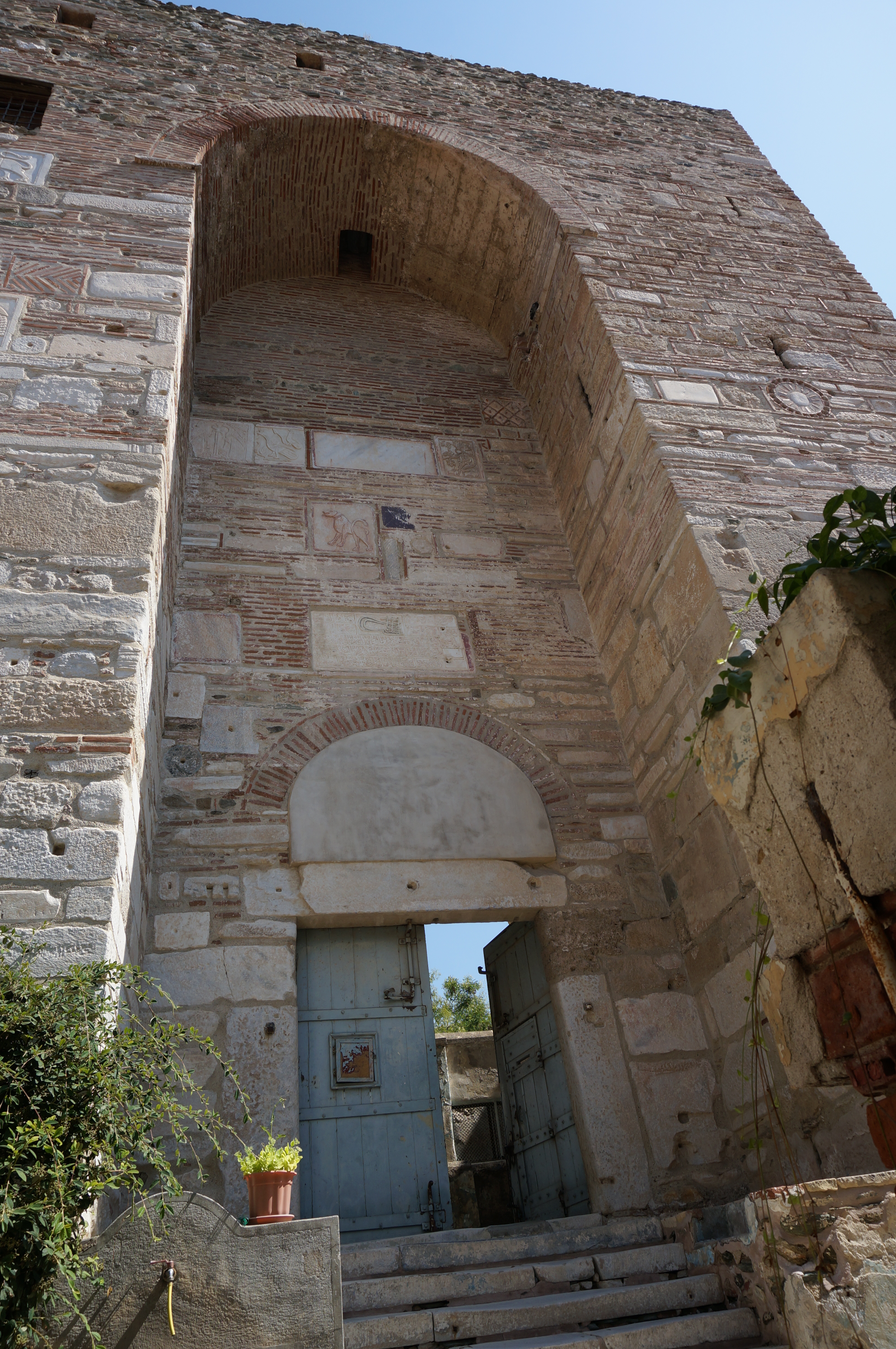 dans la ville de Salonique.